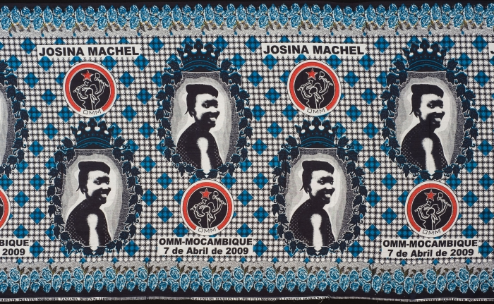 Herinneringsdoek van Josina Machel, de eerste vrouw van Samora Machel, de eerste president van Mozambique (1975-1986), lid van Frelimo, het bevrijdingsfront. Ze stierf in 1971. Ze werd ikoon voor de Vrouwenbeweging van Mozambique, en haar sterfdag op 7 april is de Dag van de Mozambikaanse vrouw. Herinneringsdoeken vormen een wijdverspreid maar relatief onbekend fenomeen sinds de jaren van onafhankelijkheidsverklaringen vanaf de jaren '60 in Sub-Sahara Afrika. Ze worden gemaakt en gedragen vanwege een politieke gebeurtenis, zoals de electie van een nieuwe president, een aantal jaar onafhankelijkheid of de komst van een vreemd staatshoofd. Ook andere dan politieke gebeurtenissen worden zo gevierd: de inaugrautie van een kerk, de komst van de Paus, de landing op de maan en de dood van Michael Jackson. De doeken zijn gemaakt om gedragen te worden, vooral door vrouwen, als wikkeldoek om de heupen, of tot kleding vermaakt. Het is gebruikelijk dat grote groepen mensen dan dezelfde stof dragen.